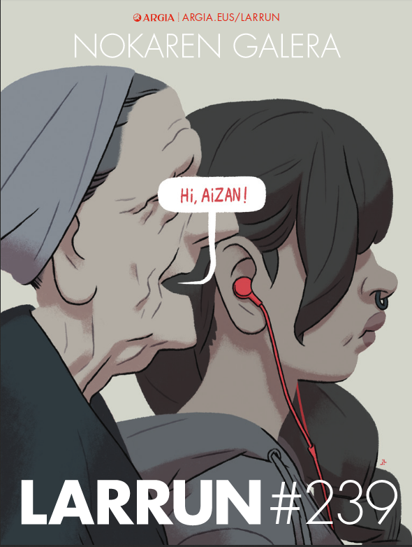 Nokaren galera. Argia (Larrun #239 - Azala)